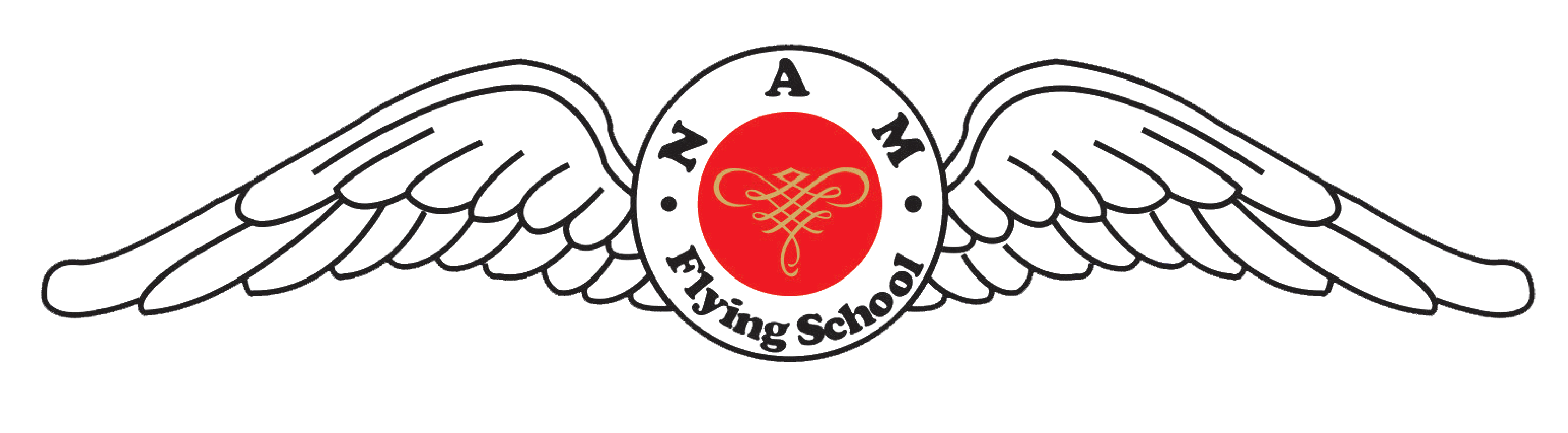 NAM Flying School memiliki logo yang sama dengan Sriwijaya Air karena merupakan bagian dari Sriwijaya Group